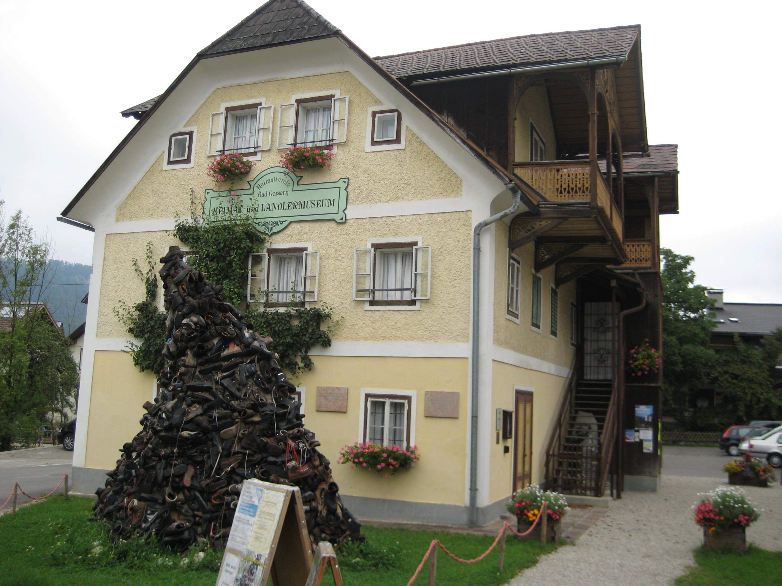 Heimat- und Landlermusem in Bad Goisern